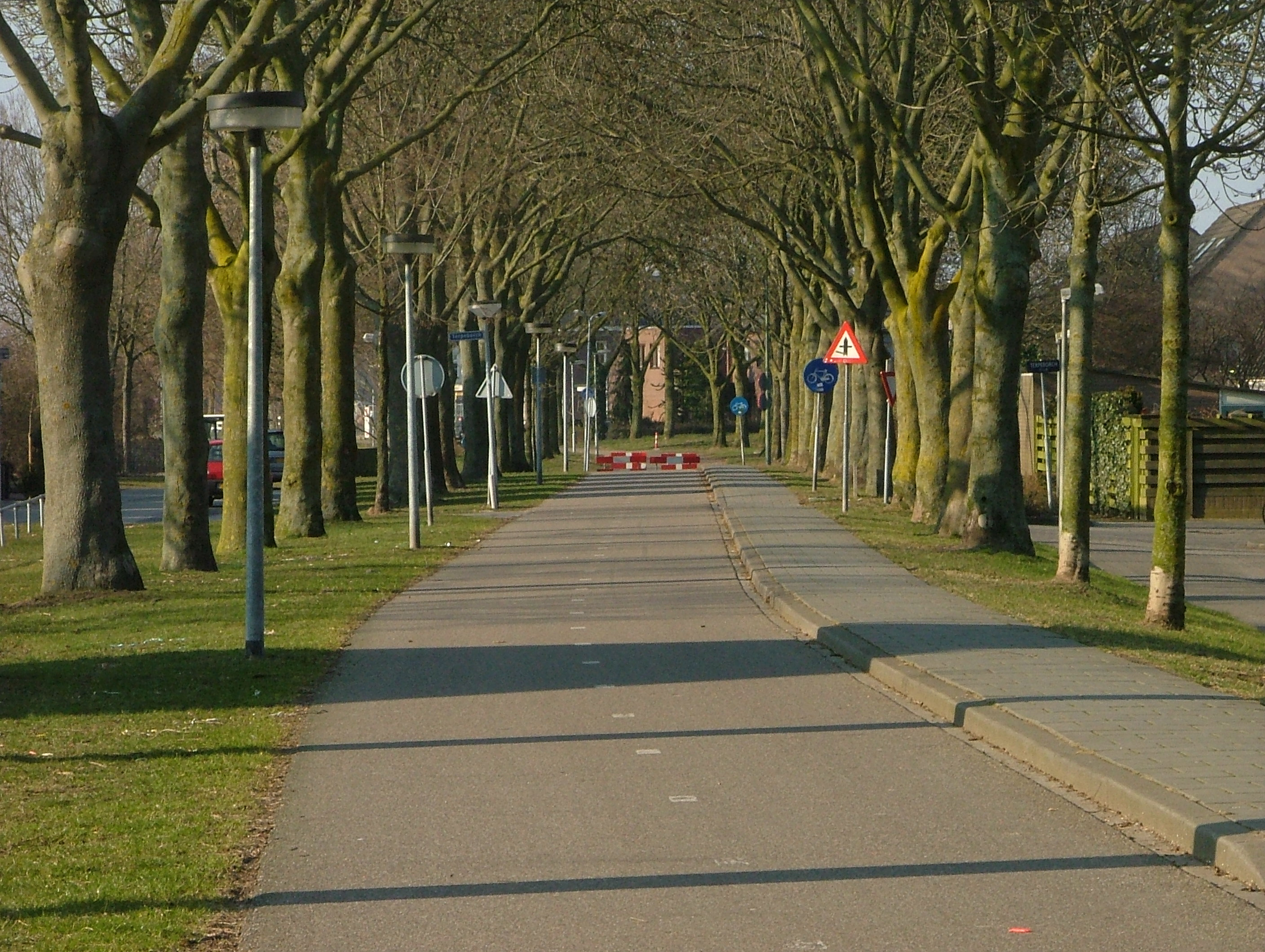 Oude Dijk Rosmalen, oude weg naar Gewande, thans een fietspad. Eigen materiaal Geert C. Smulders, Rosmalen